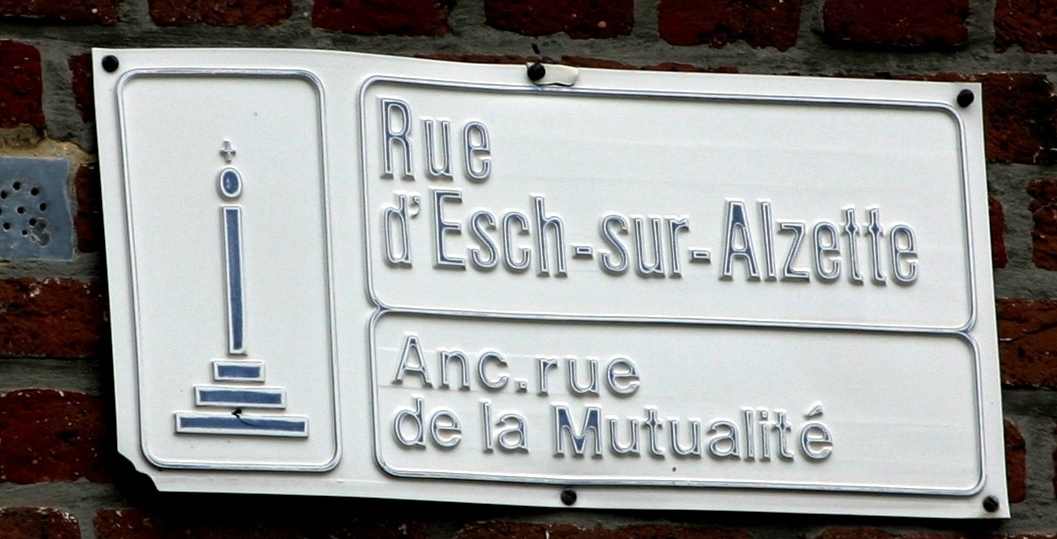 Esch-Strooss zu Léck